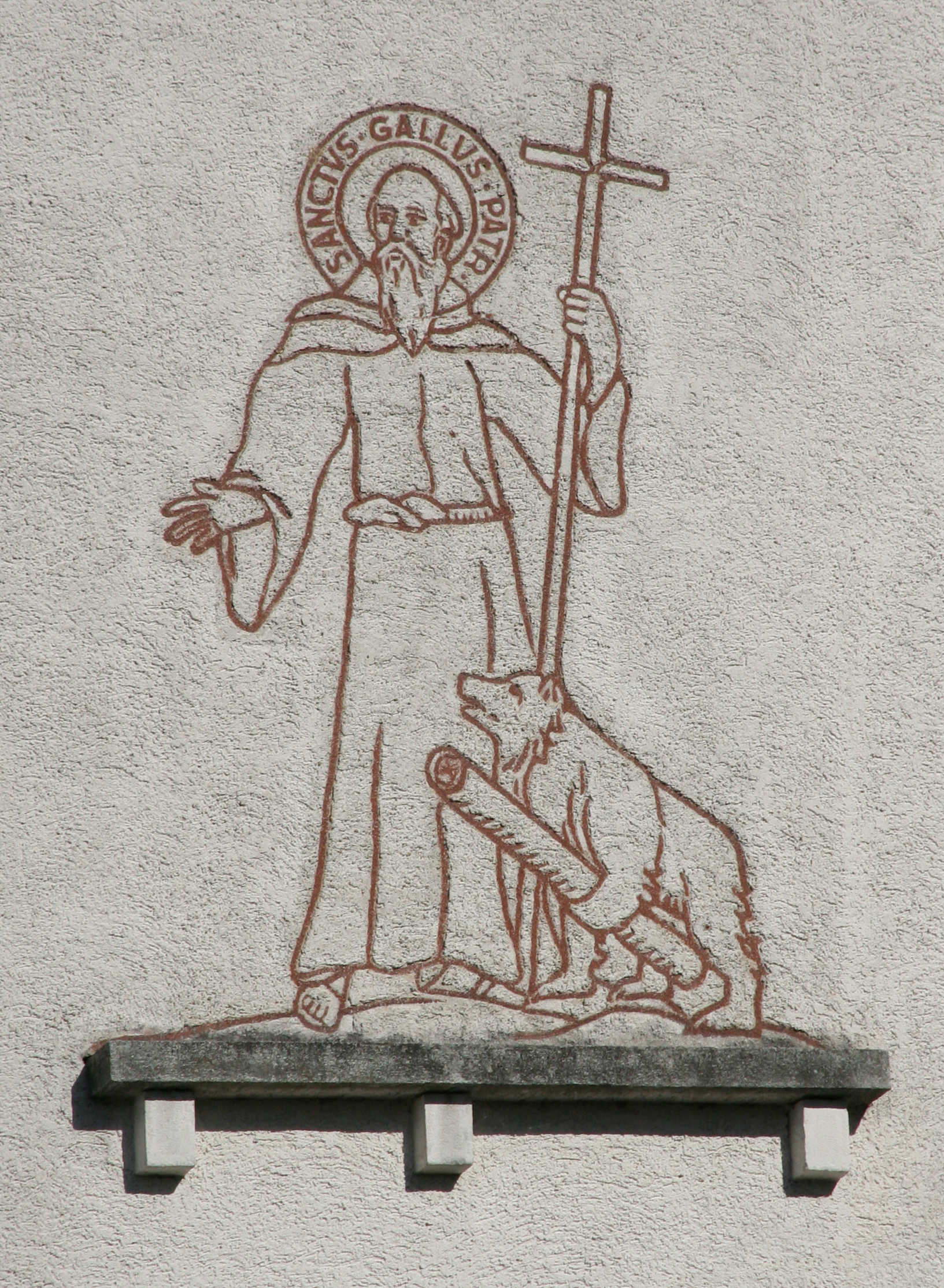 Römisch-katholische Kirche Liebfrauen Oberstammheim, Gallus-Bildnis am Kirchturm